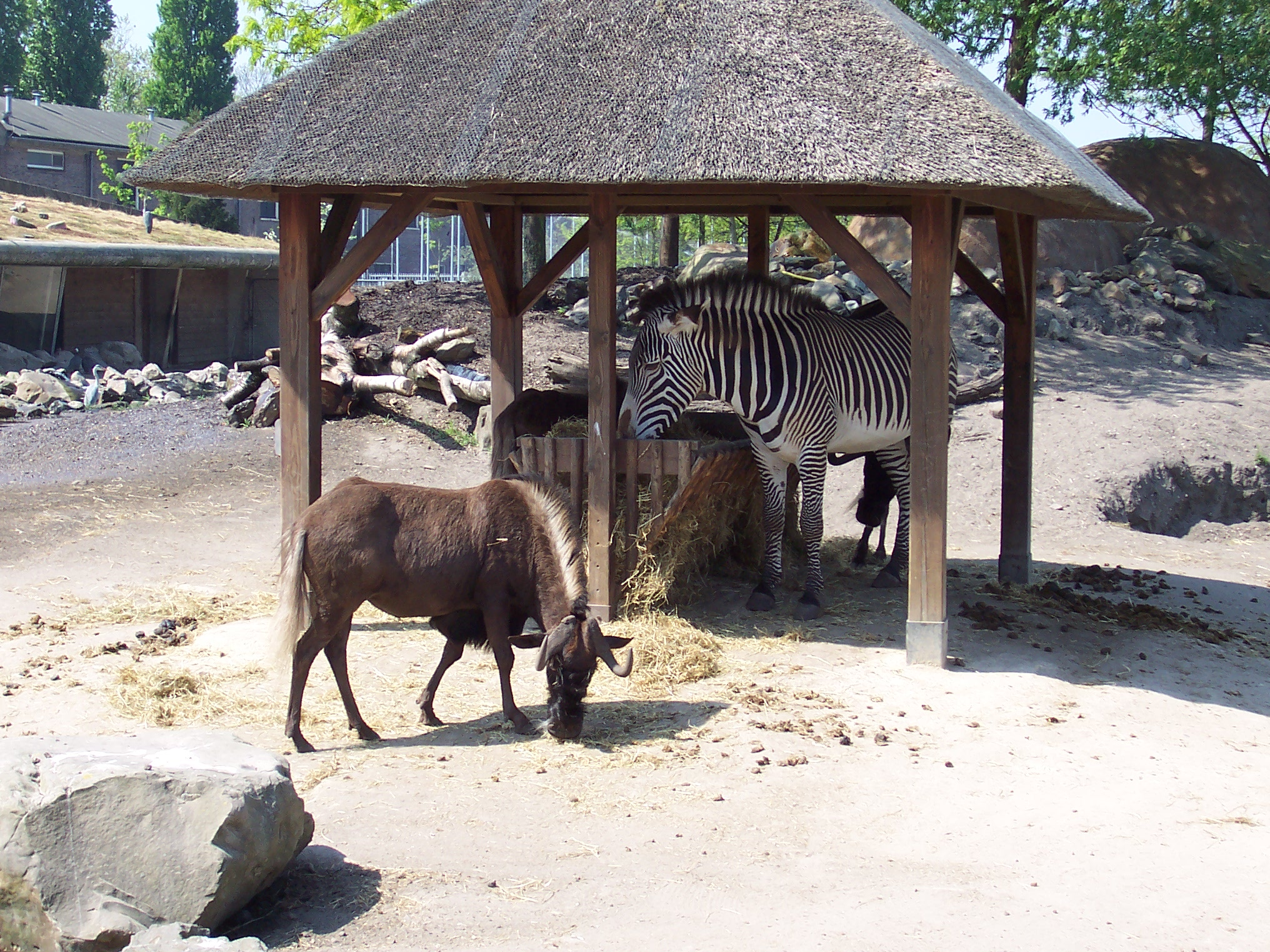 Grévy Zebra and Whitetailed Wildebeest in Artis Zoo, Amsterdam